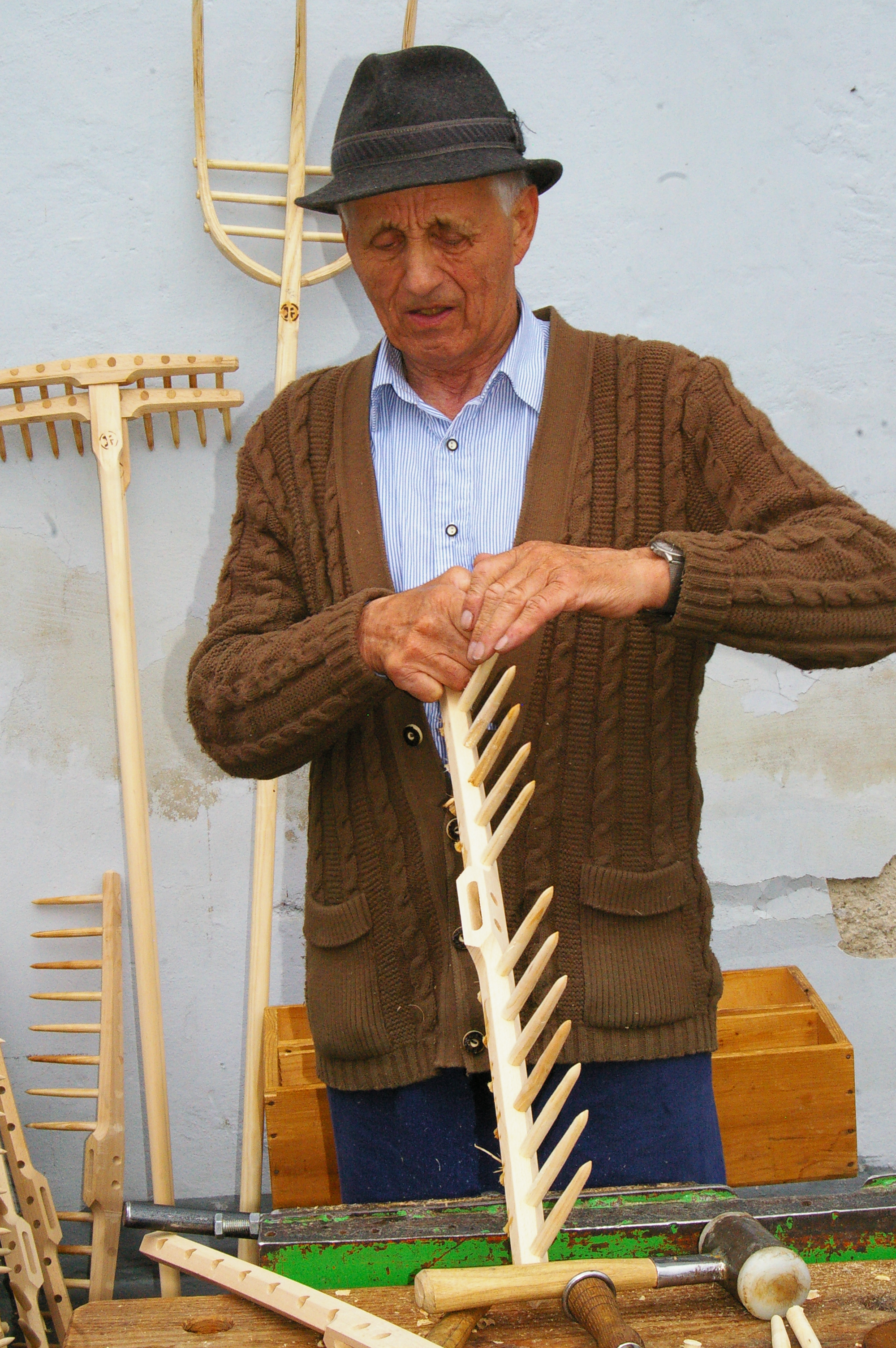 Rechenmacher auf einem Handwerksmarkt